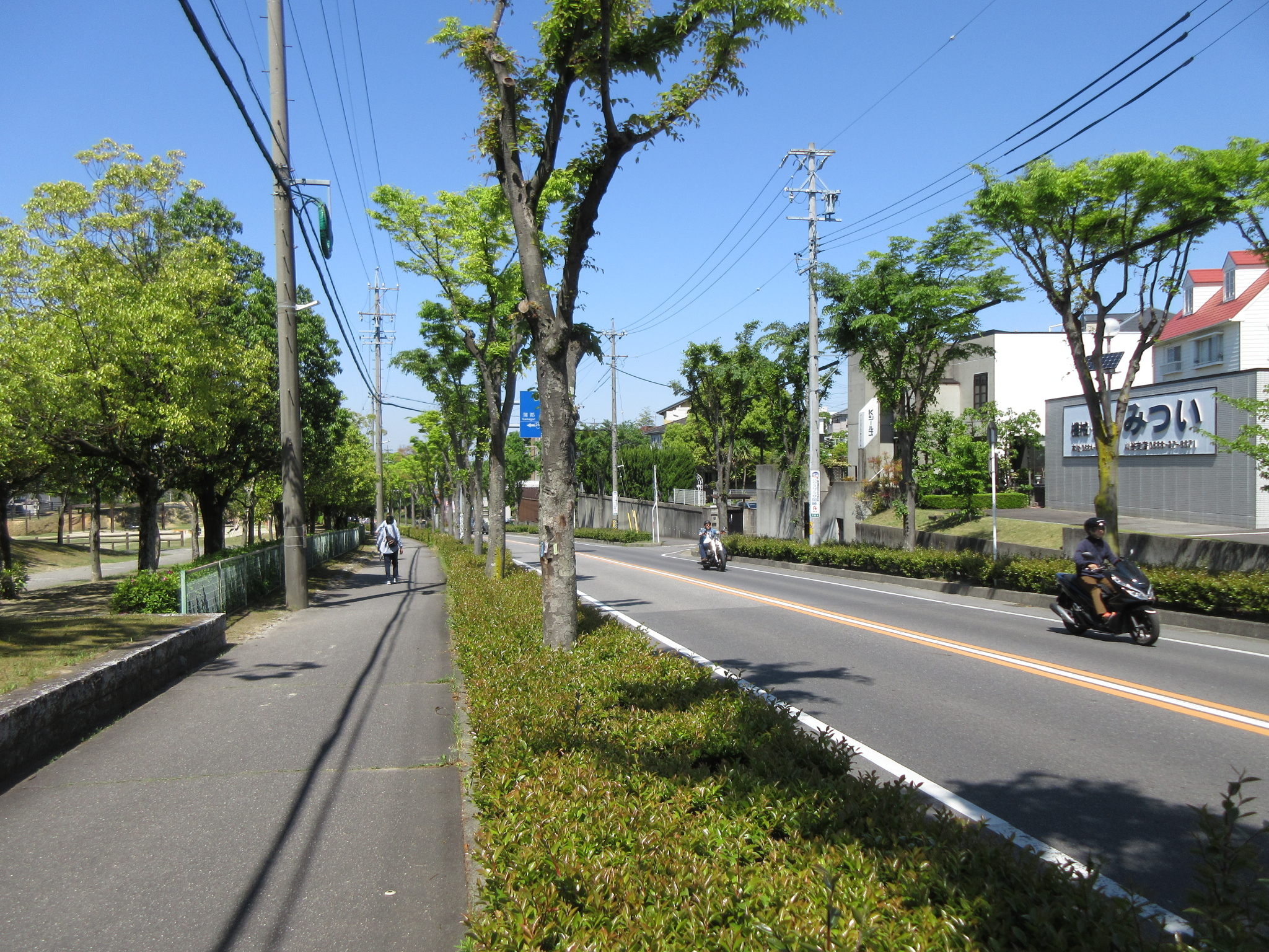 愛知県道48号岡崎刈谷線。岡崎市戸崎町。